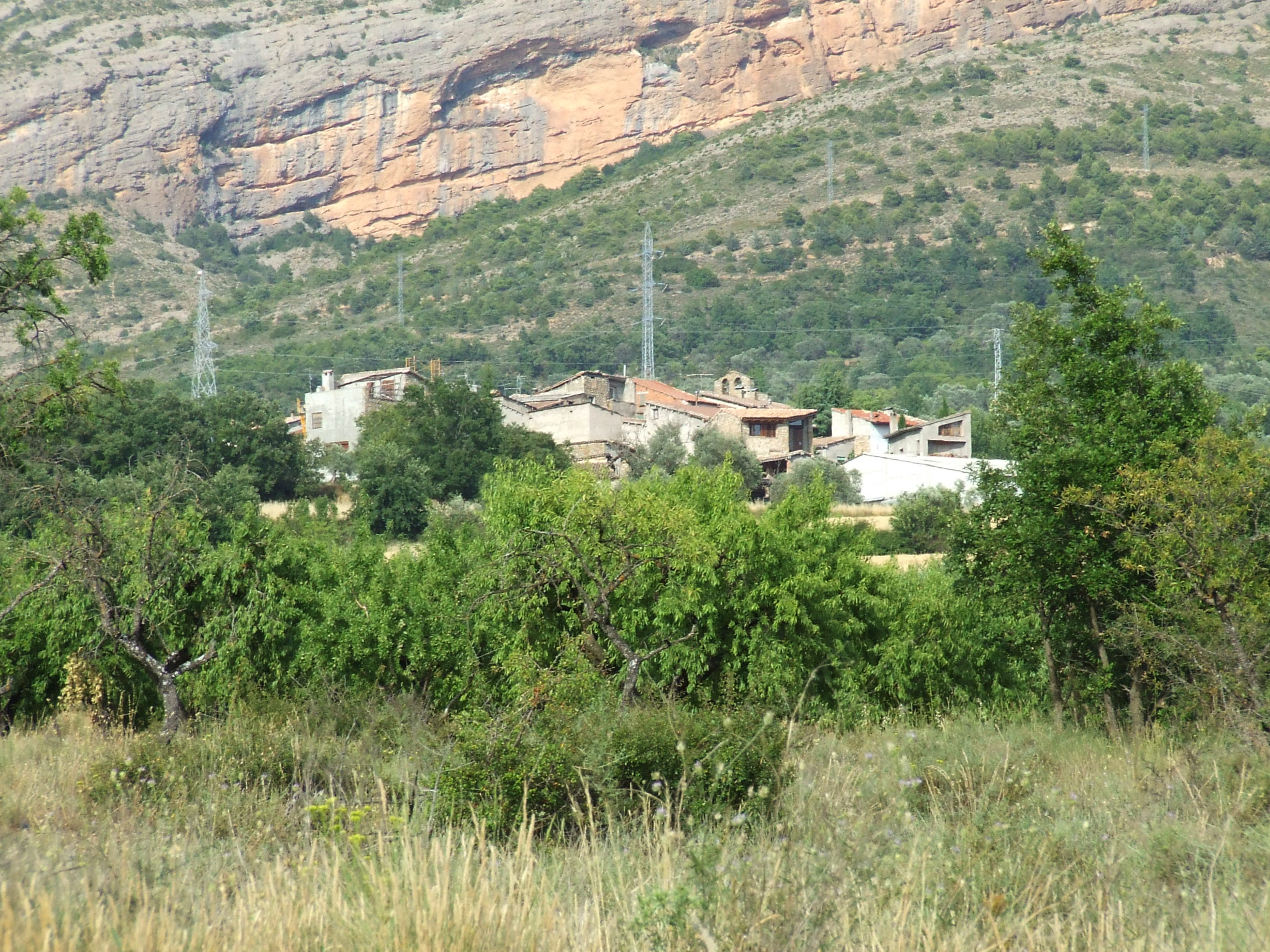 El poble de Sant Martí de Canals des del sud-oest (Claverol, Conca de Dalt, Pallars Jussà)